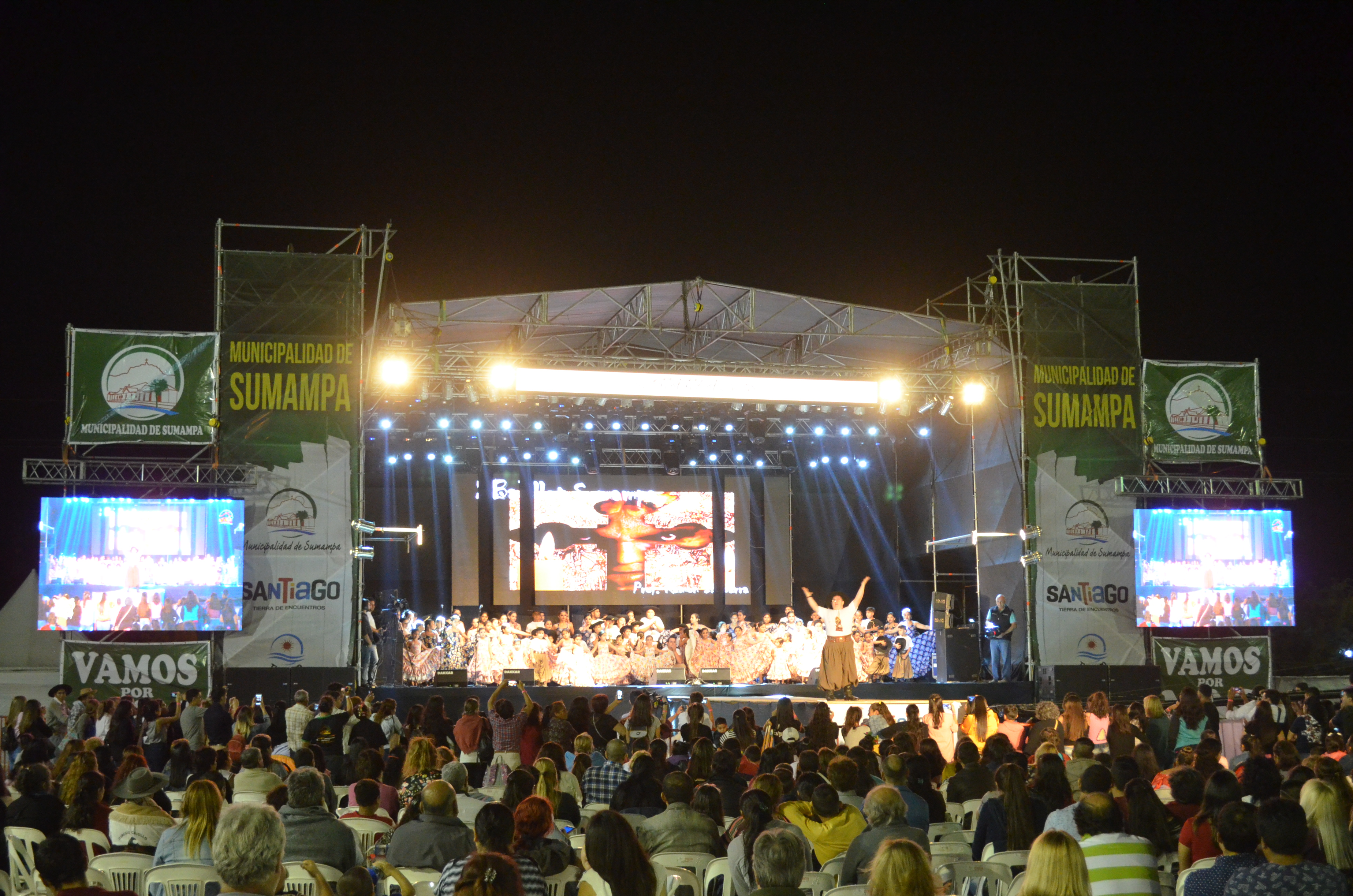 Escenario Festival de la Cancion Popular Sumampa 2018